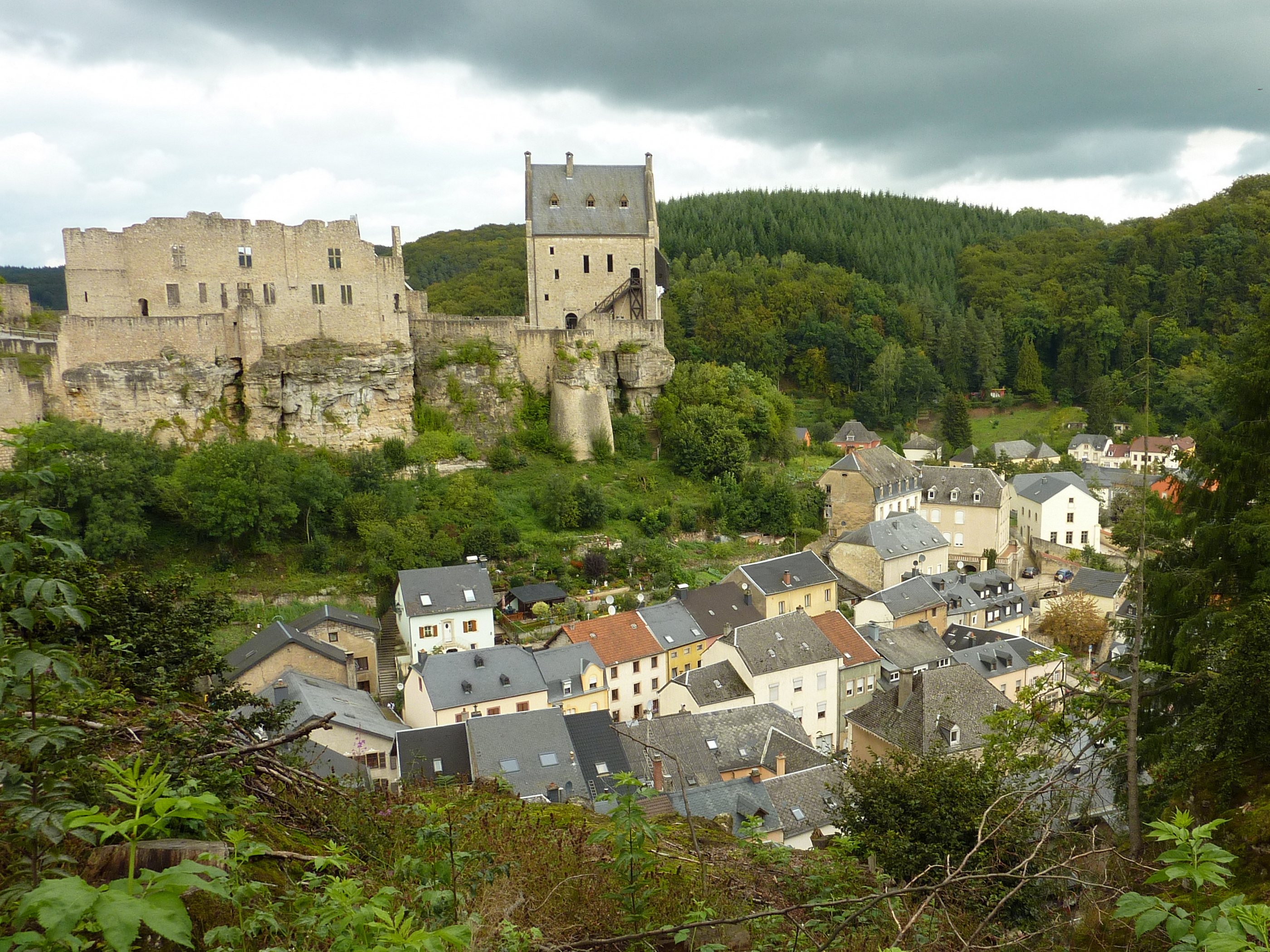 Burcht & Larochette